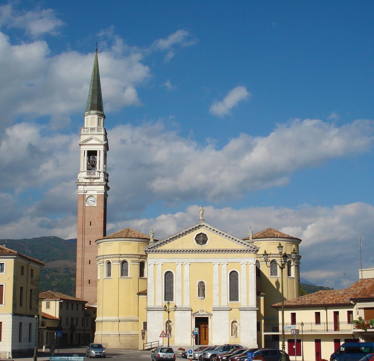 Cordignano: La piazza principale con la chiesa